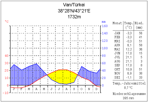 Klimadiagramm Van